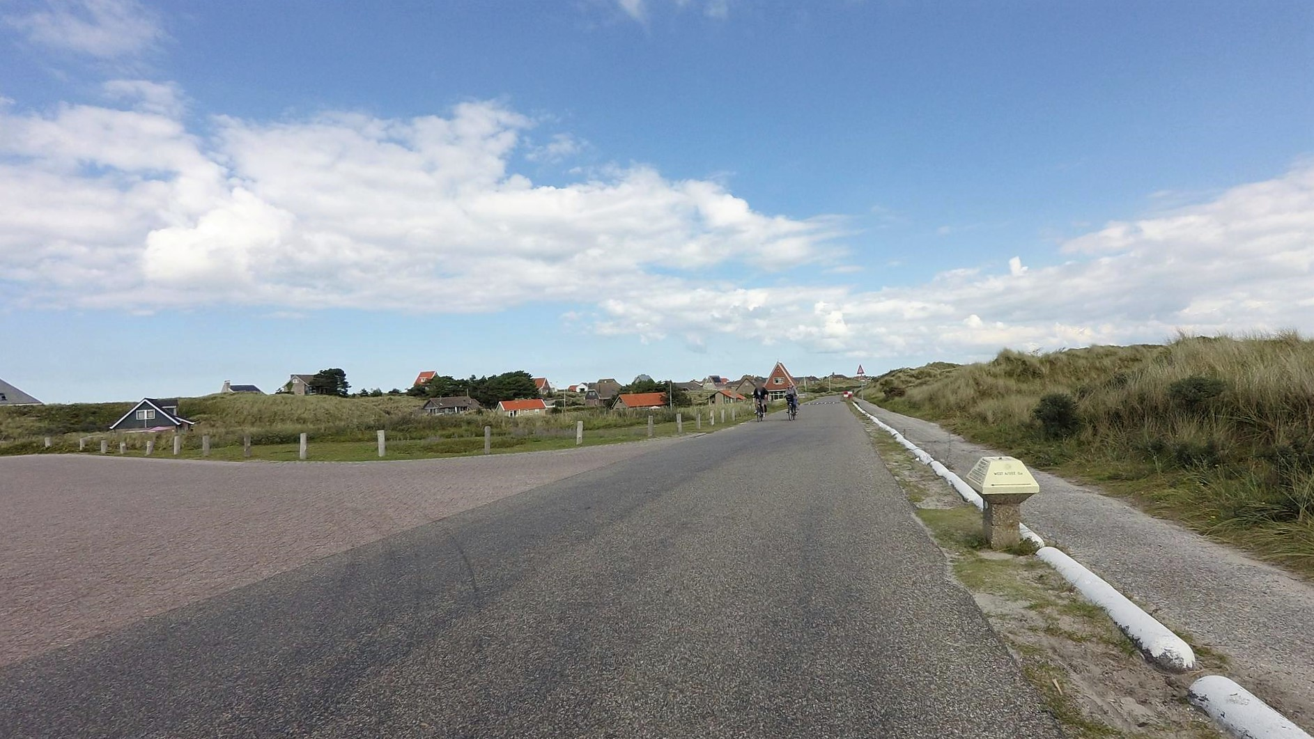 West aan Zee Badweg Terschelling